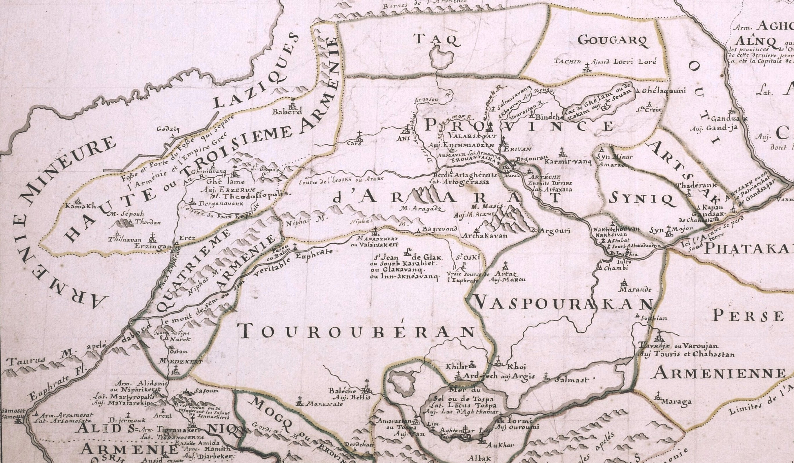 L'Arménie majeure dressée sur les auteurs arméniens et divisée en 16 grandes provinces.